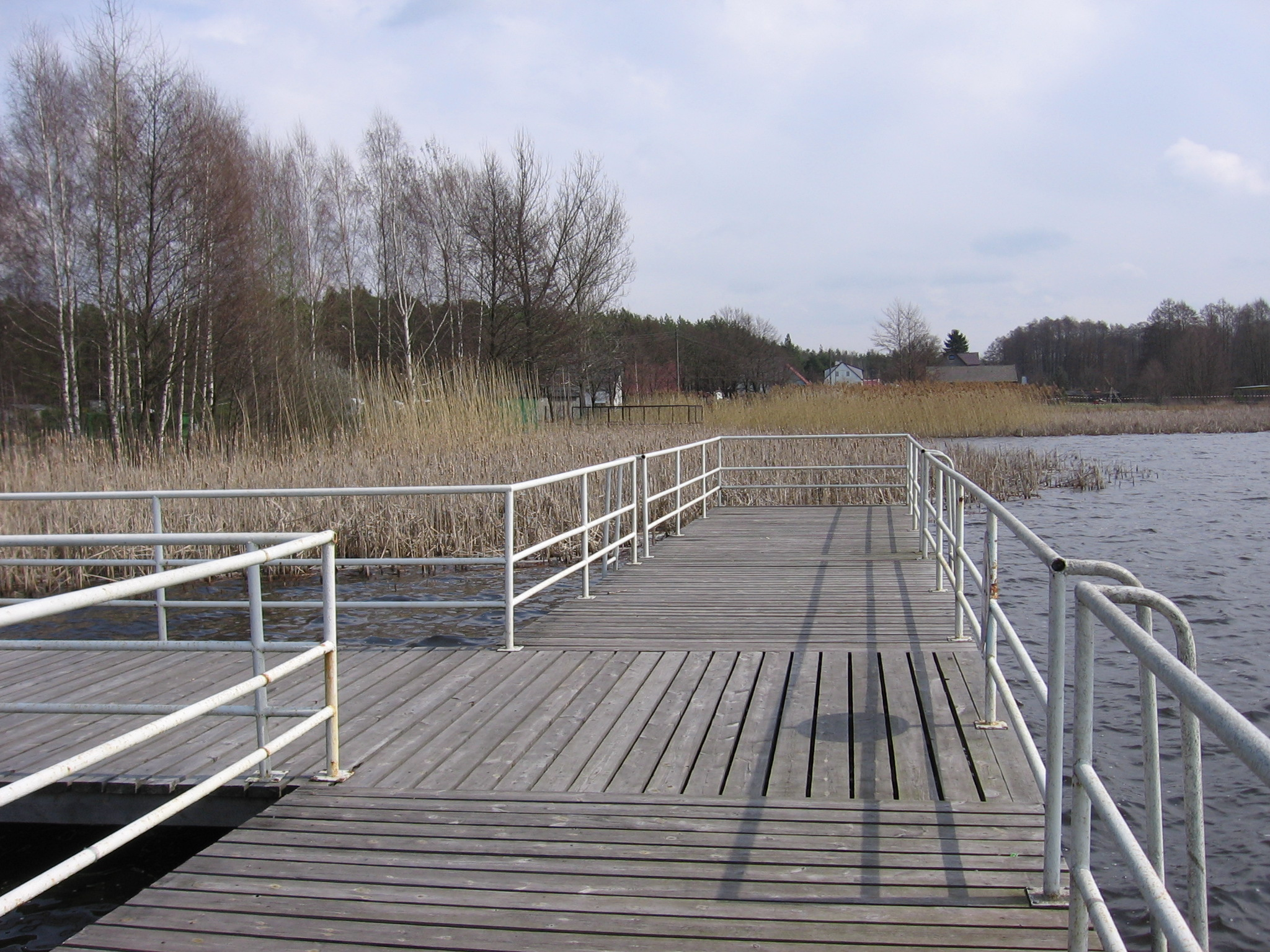 pomost w Kołatce